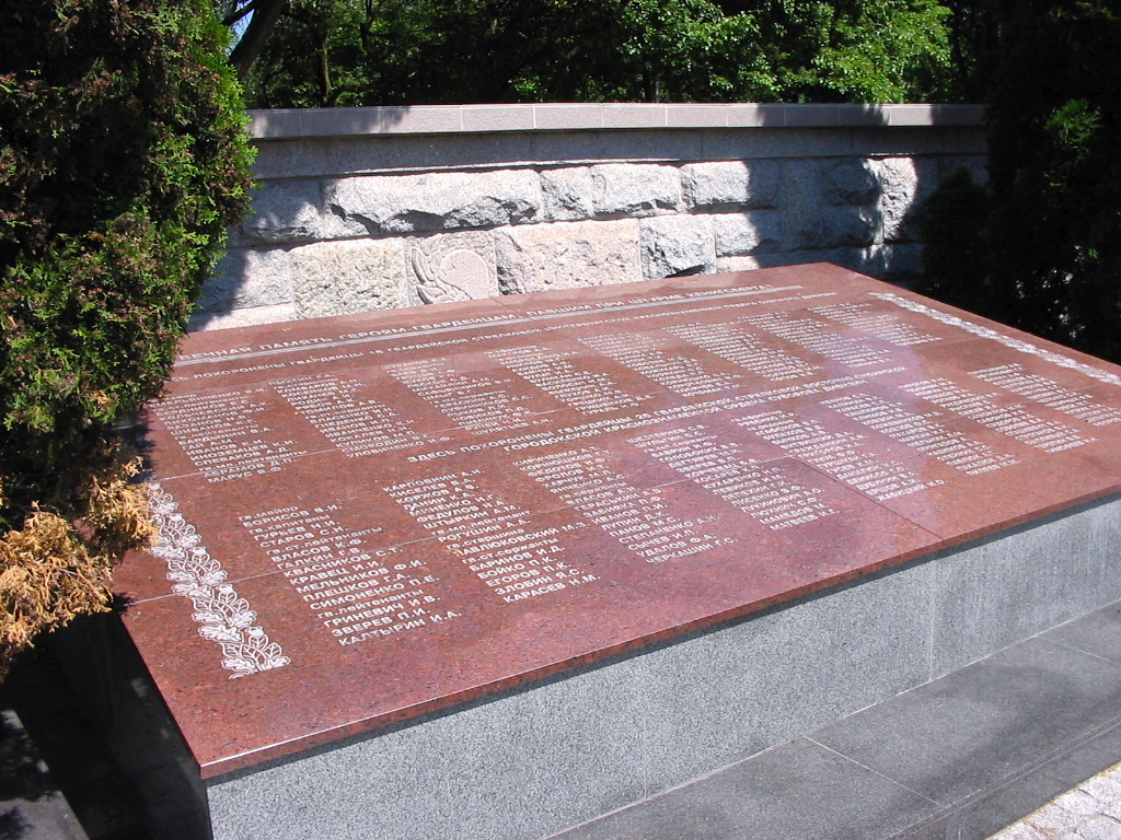 Pamyatnik 1200 gvardeitsam